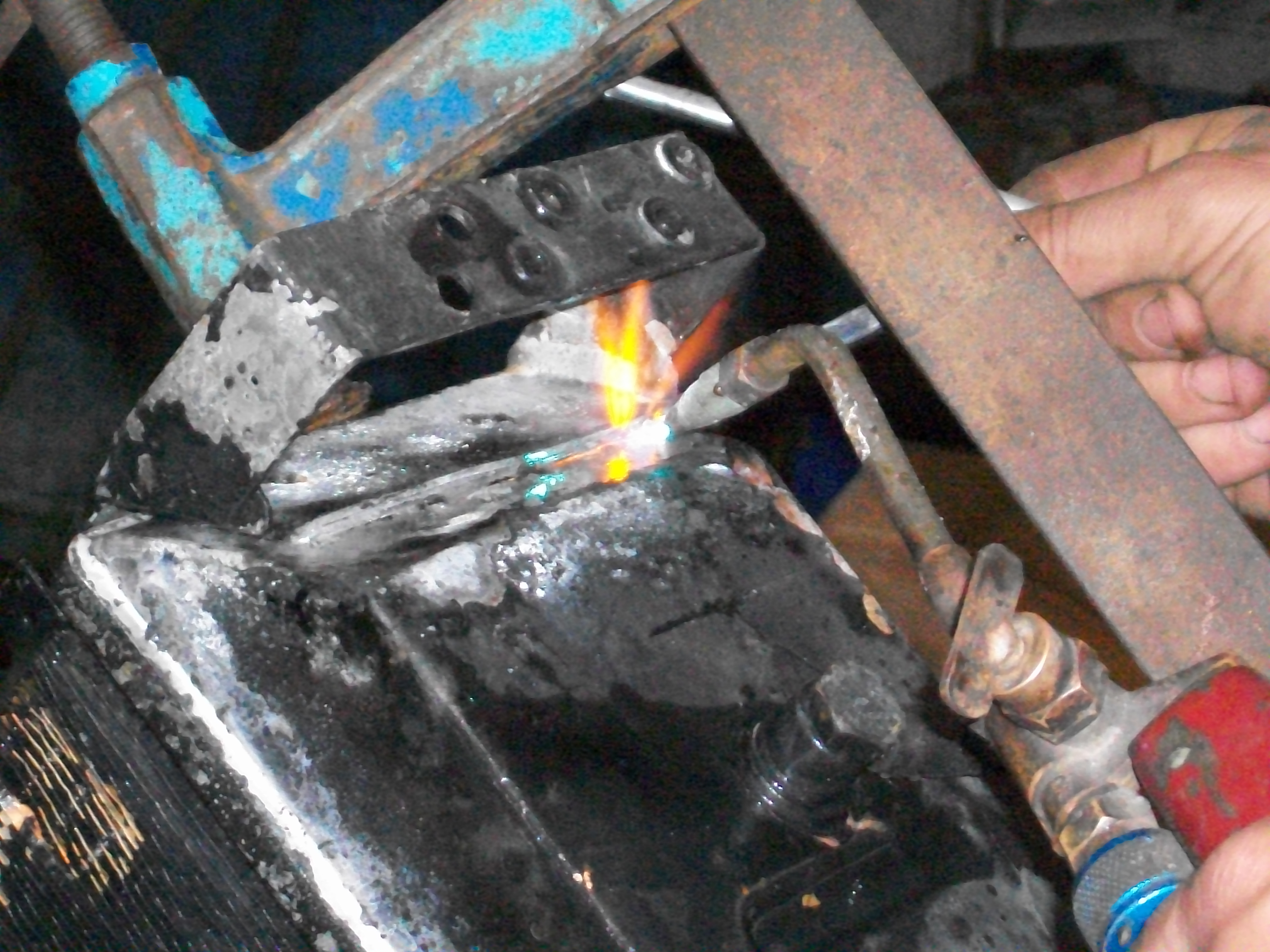 Imagen de soldado de un radiador